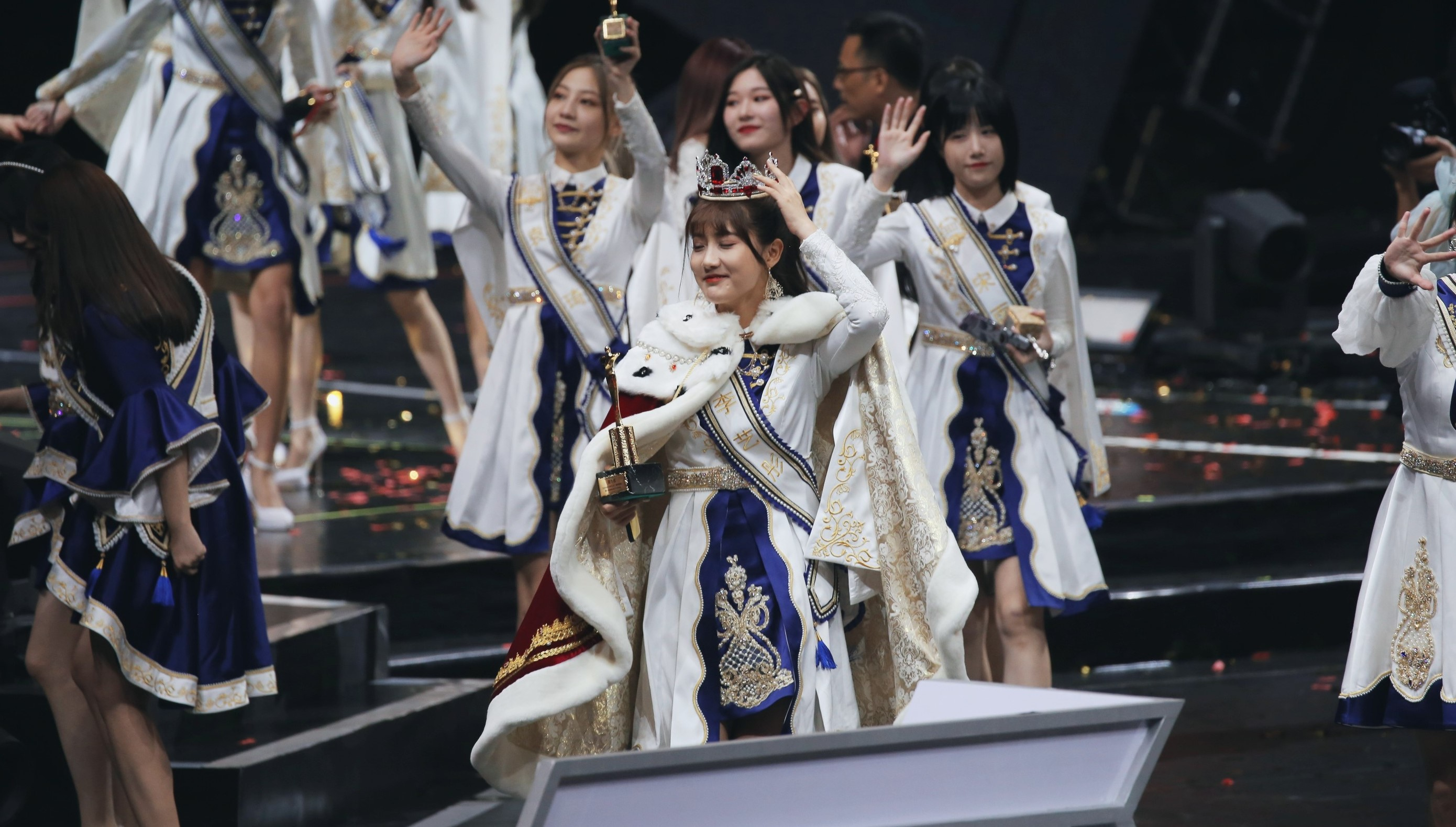 190727总选实图4P直出